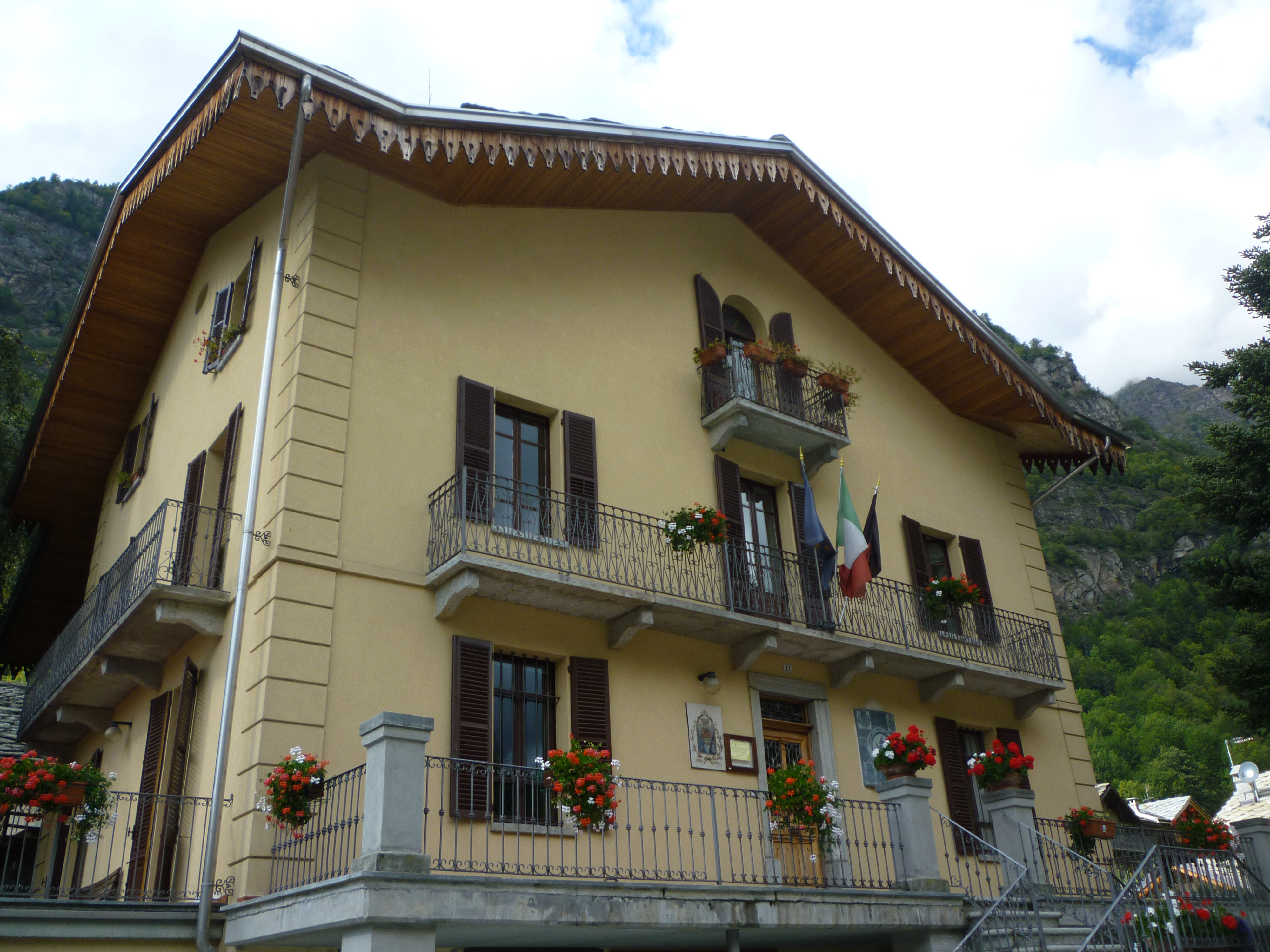 Siège de la Communauté de montagne Walser haute vallée du Lys (Issime - Vallée d'Aoste - Italie)